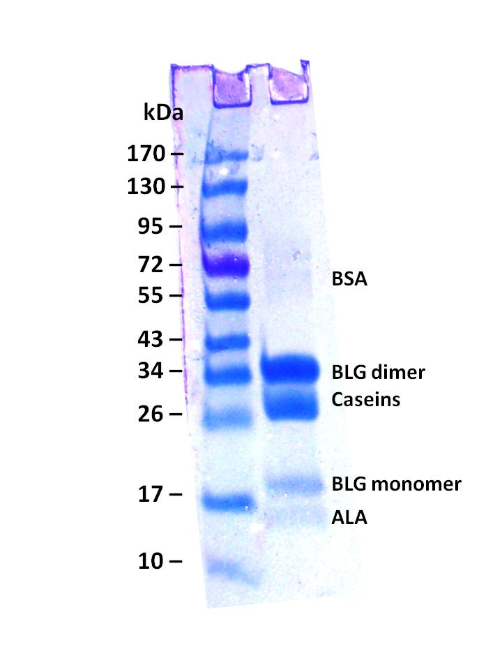 Eletroforese em gel de poliacrilamida em gradiente de dodecil sulfato de sódio com a distribuição por pesos moleculares das proteínas do leite de vaca (albumina sérica bovina, dímeros da beta-lactoglobulina, caseínas, monômero da beta-lactoglobulina e alfa-lactoalbumina)